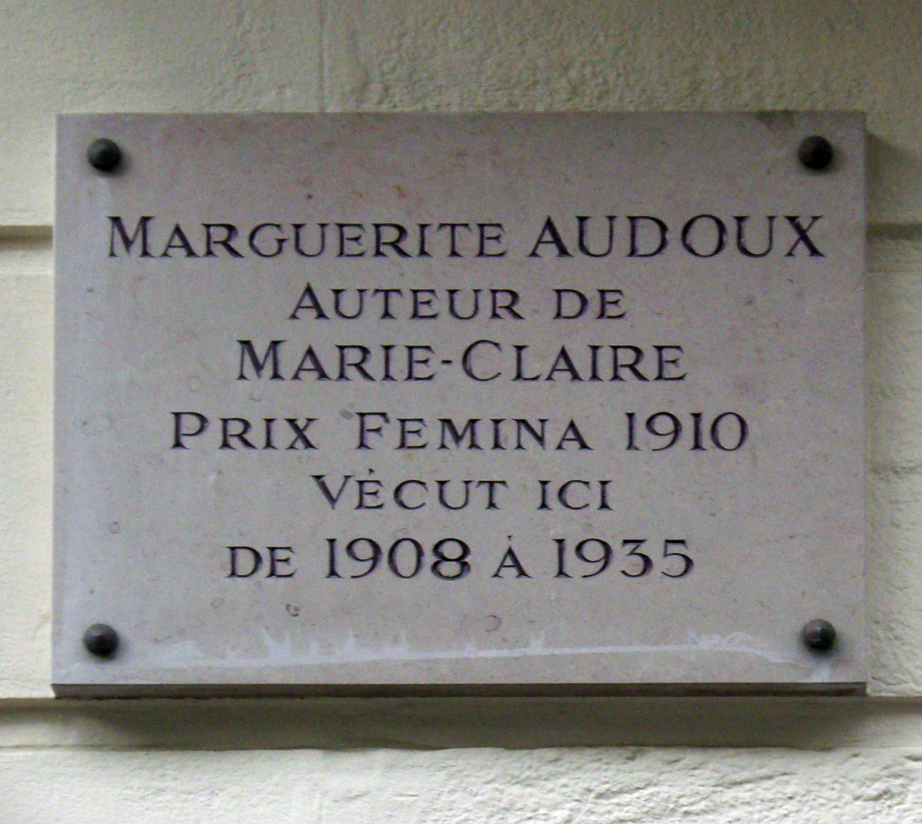 Plaque à la mémoire de la romancière Marguerite Audoux (1863-1937), au 10 rue Léopold-Robert, Paris 14e, où elle vécut de 1908 à 1935.